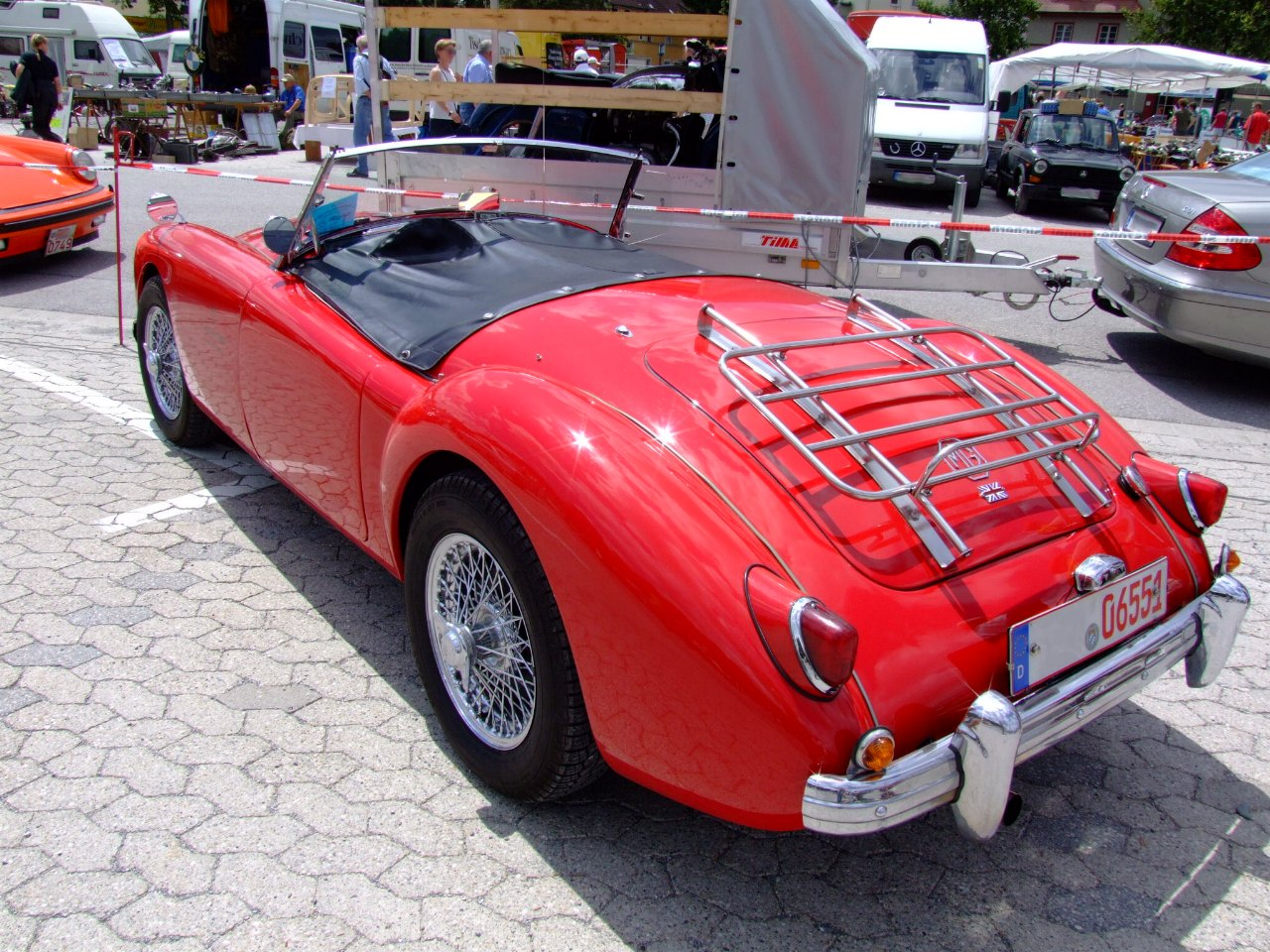 MG A